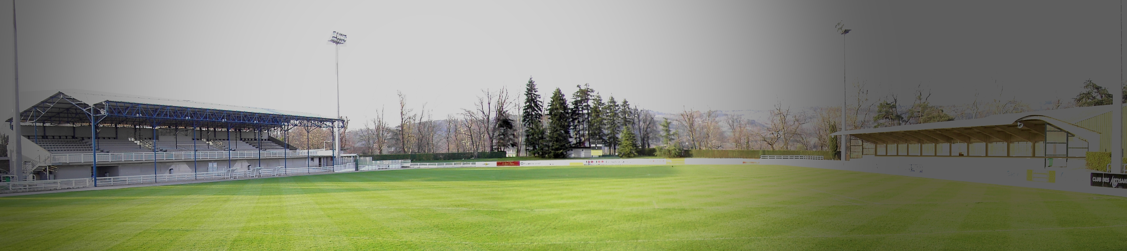 Stade municipal de Mazamet